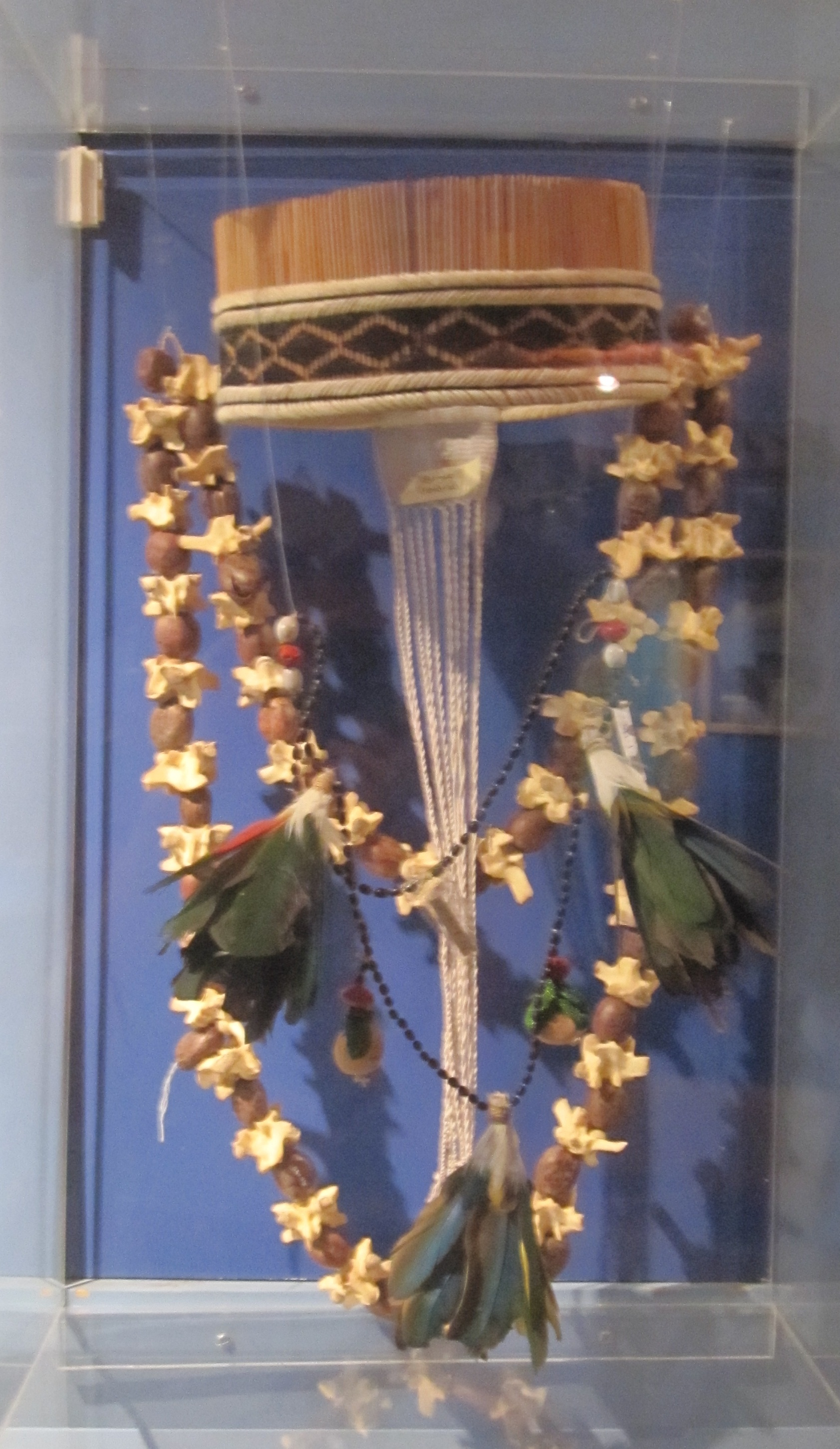 Amazonian Quichua ornamentation